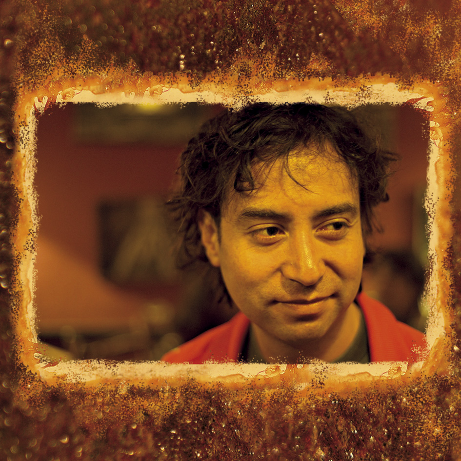 sesion de fotos disco banda ancha 2007